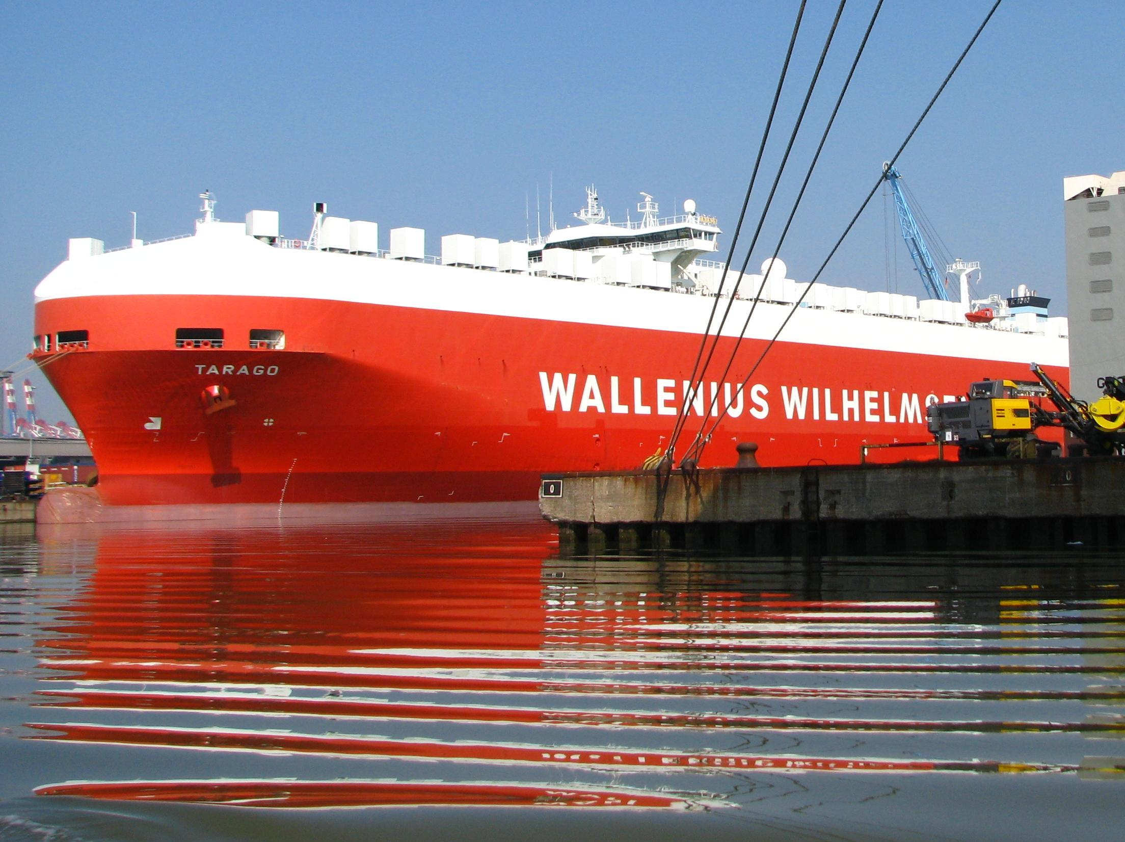 Autofrachter Tarago der Firma Wallenius Wilhelmsen im Hafen von Bremerhaven.